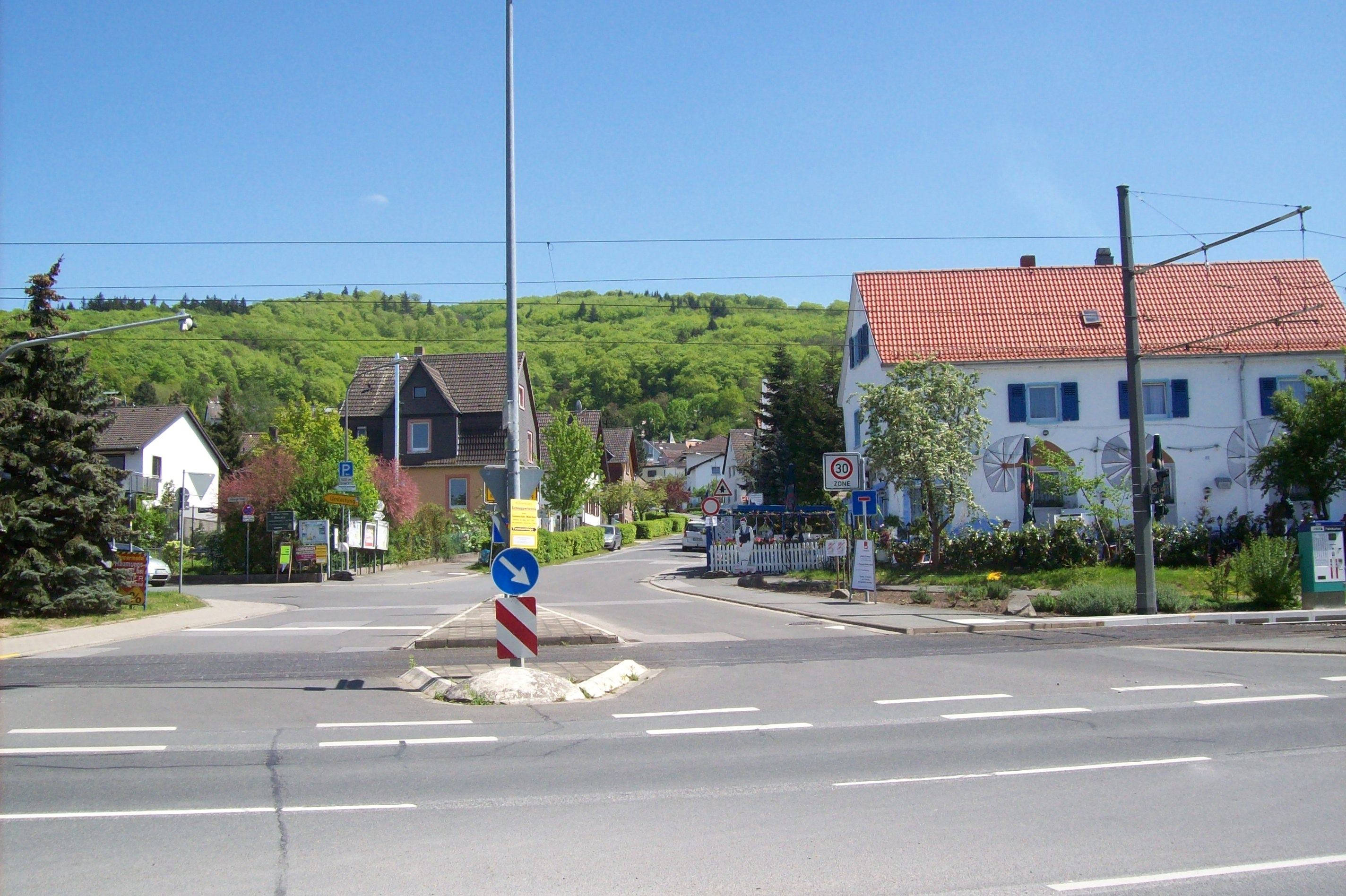 Ortseinfahrt von Malchen, Seeheim-Jugenheim, Hessen von der Alten Bergstraße her.